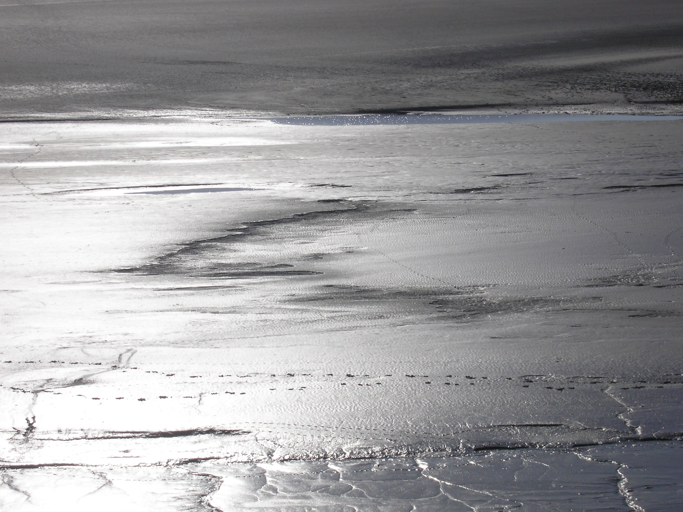 Vains (Normandie, France). Tangue sur le littoral du Grouin du Sud.